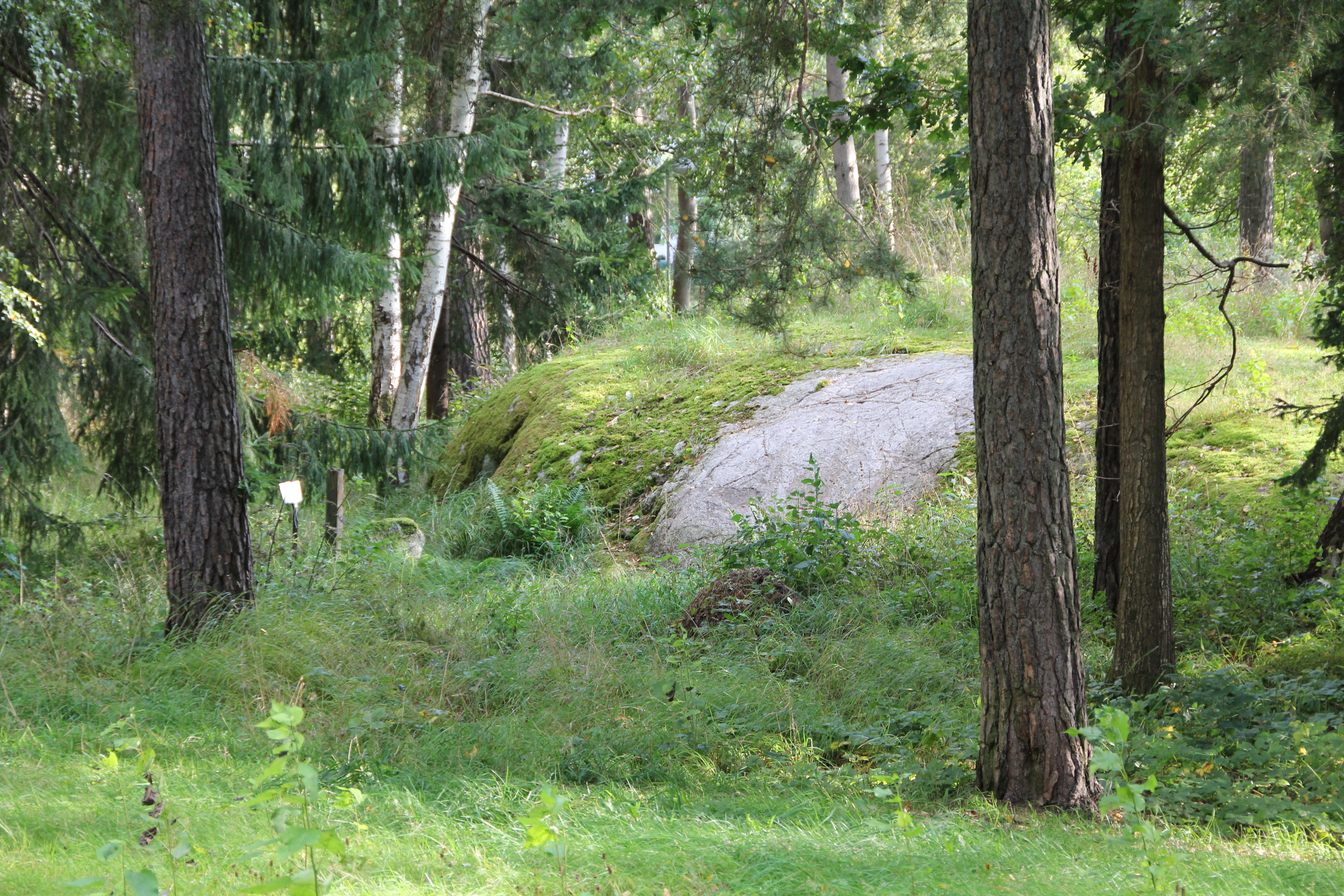 Runhällen U RR1987;134 (Granbyhällen) i Husby, Stockholm. Översiktsbild.